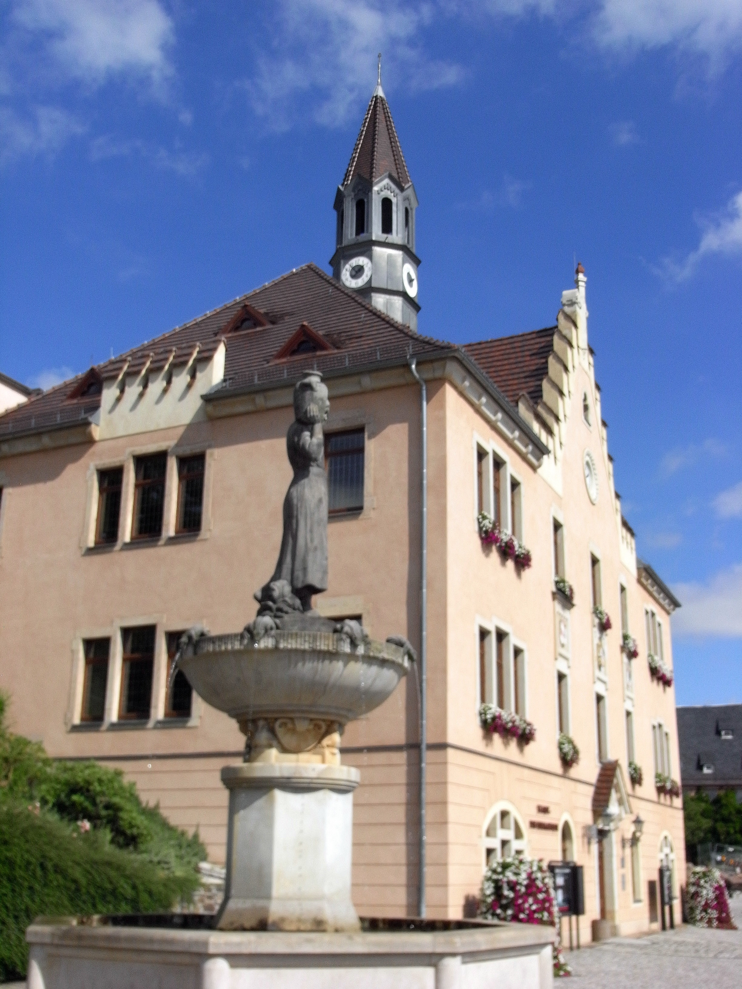 Hohenstein-Ernstthal, Rathaus und Brunnen mit Brunnenplastik, Altmarkt 41, an Stelle des einstigen Brauhauses 1702/03 errichtet, 1905 im historischen Stil umgebaut.